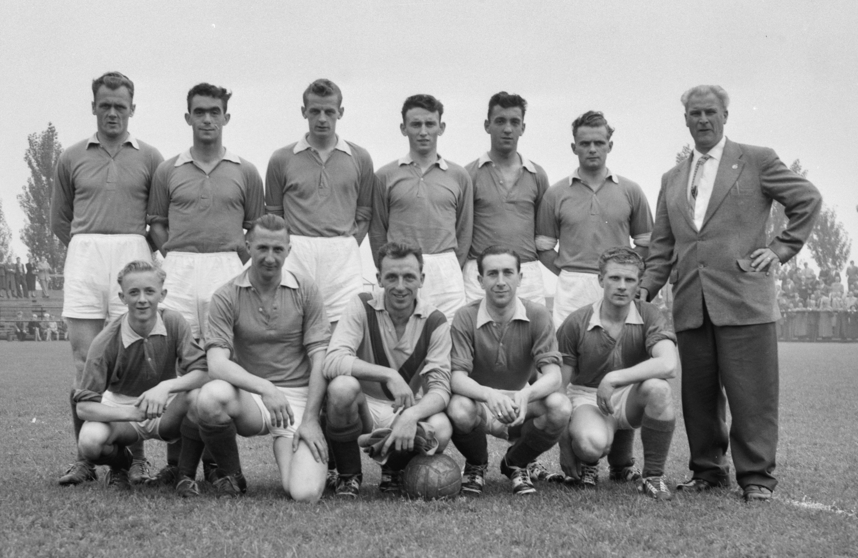 NOAD tegen BVC Amsterdam. NOAD elftal. Onder meer: Jan Loose, Ab Kentie, Piet Ebbing, Theo de Wilde, Kees van Dijke